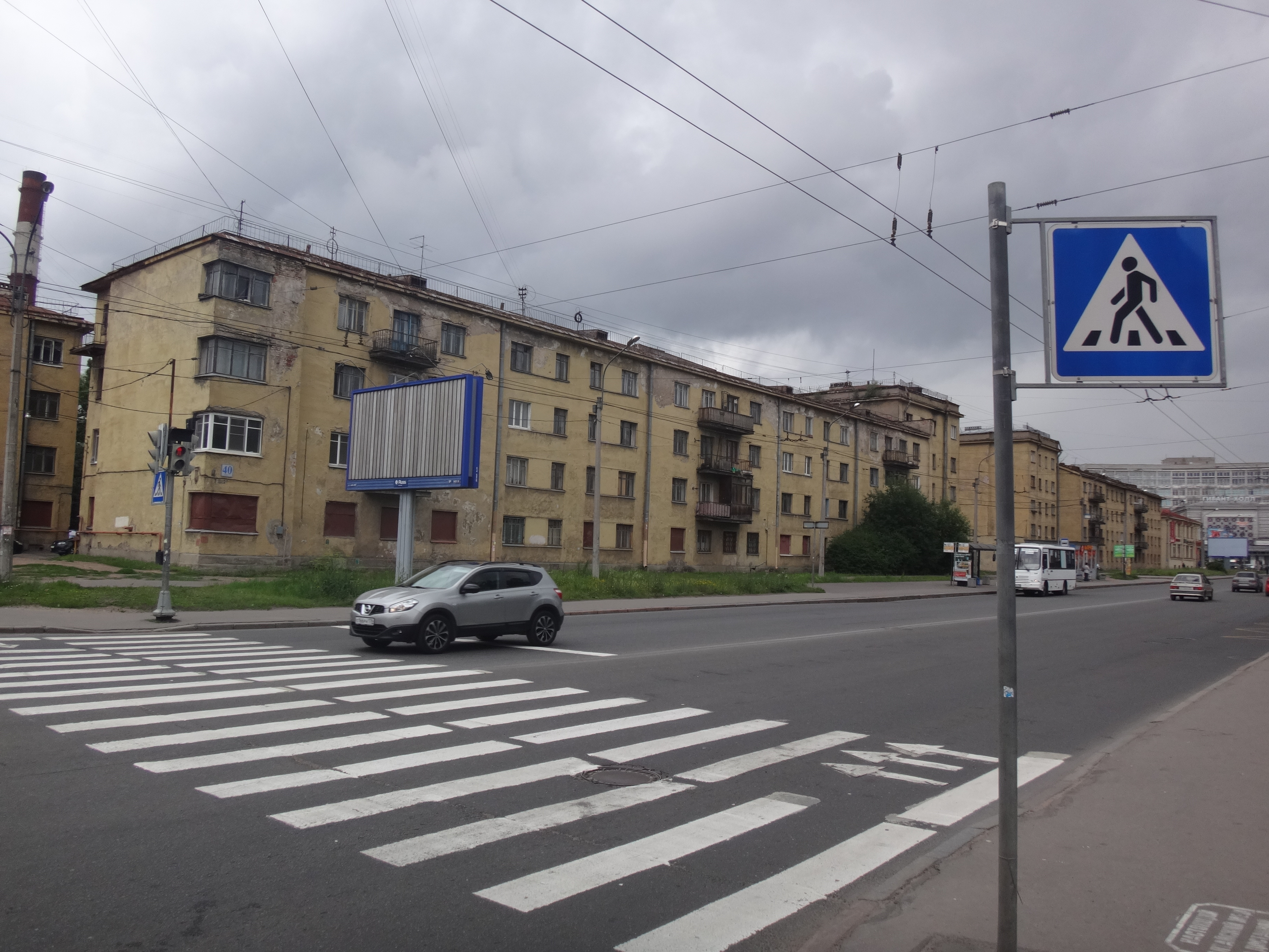 Сороковые корпуса